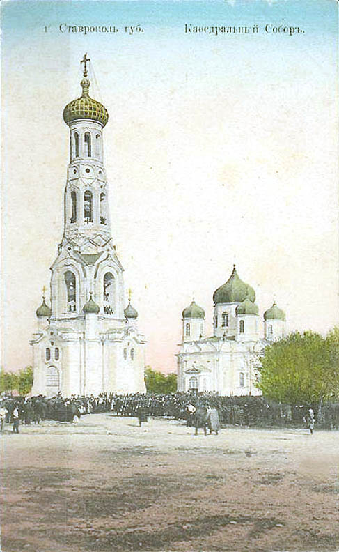 Казанский собор в Ставрополе. Открытка